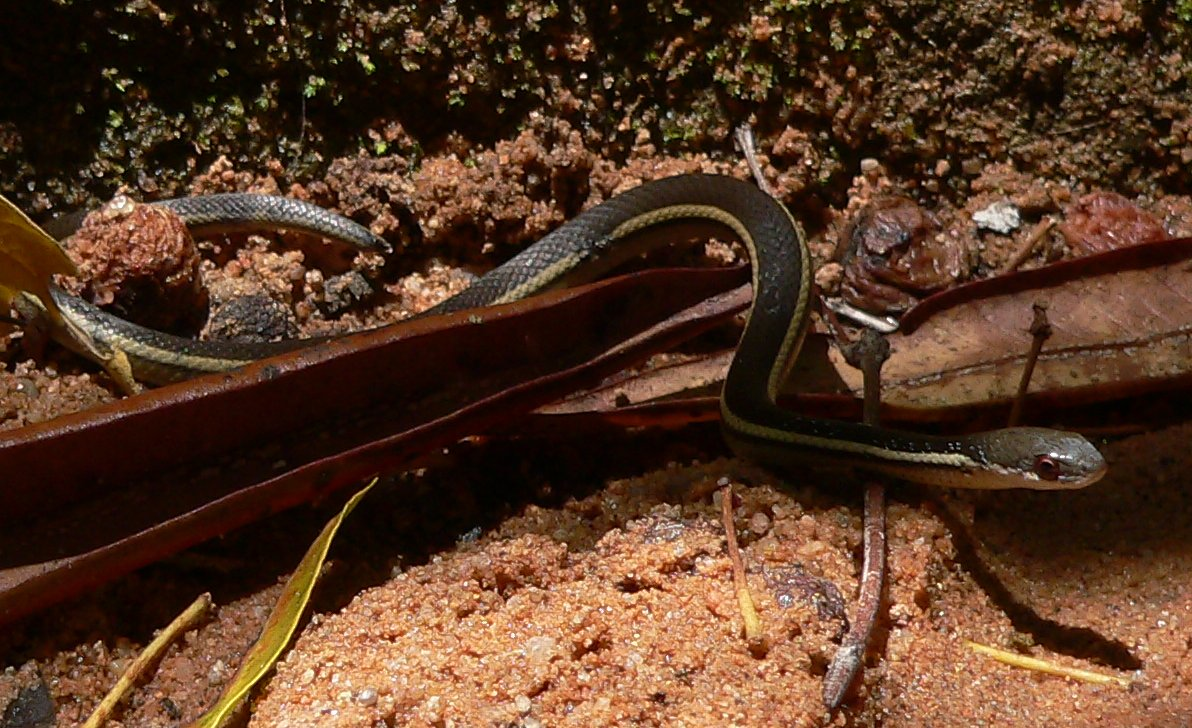 Bibilava lateralis (Colubridae), Namaza Valley, Isalo National Park, Madagascar